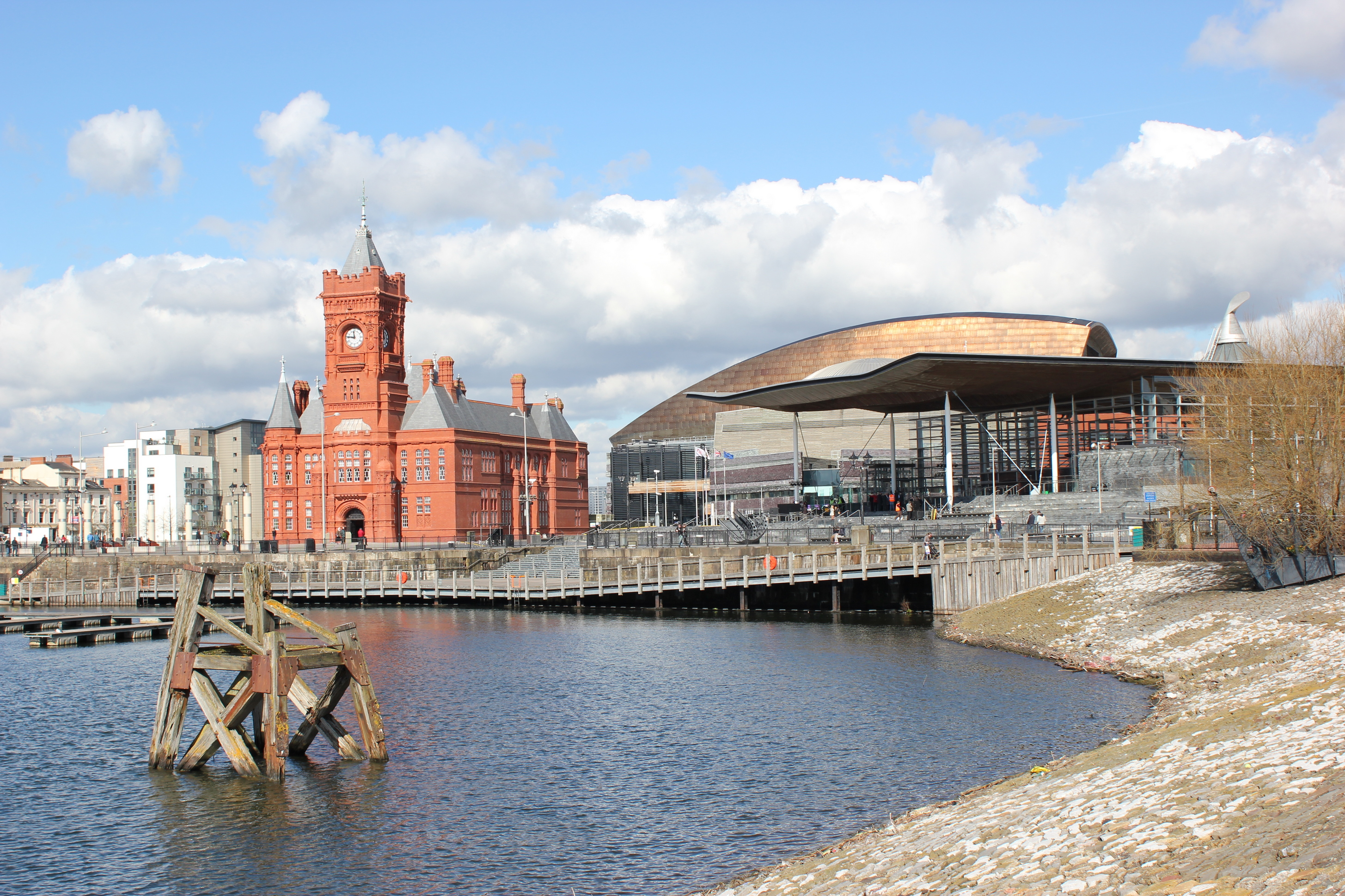 Pierhead Building, das Wales Millennium Centre und der Senedd (das walisische Parlament) am Hafen von Cardiff.